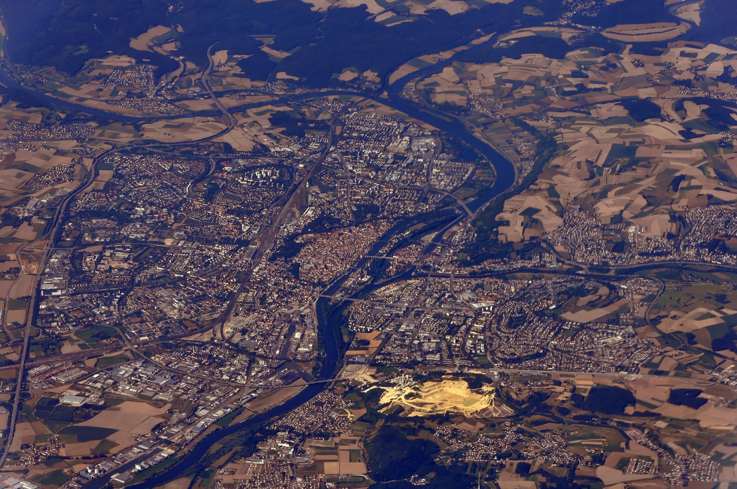 Bilder vom Flug Hannover Rom August 2014